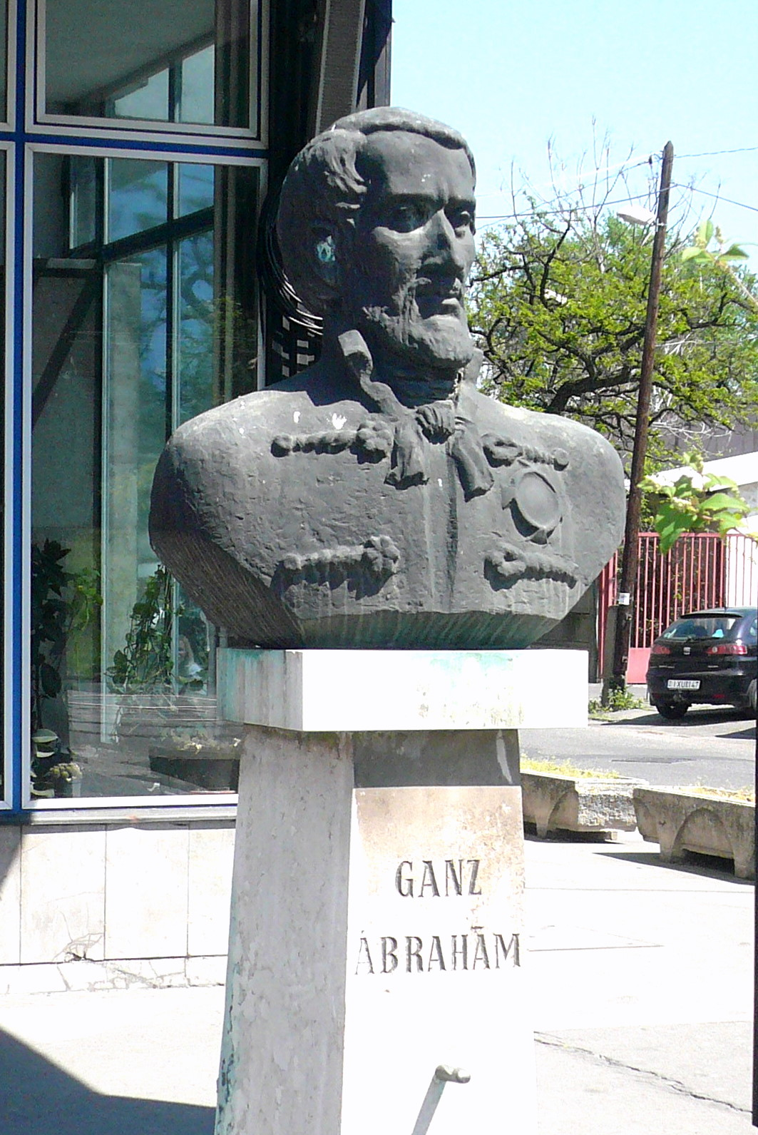 Ganz Ábrahám mellszobra a GANZ Műszer Rt. épülete előtt, Budapest XIX., Üllői út 200. Másik kép erről a szoborról: File:Budapest-kispest-ganz-mellszobor.jpg